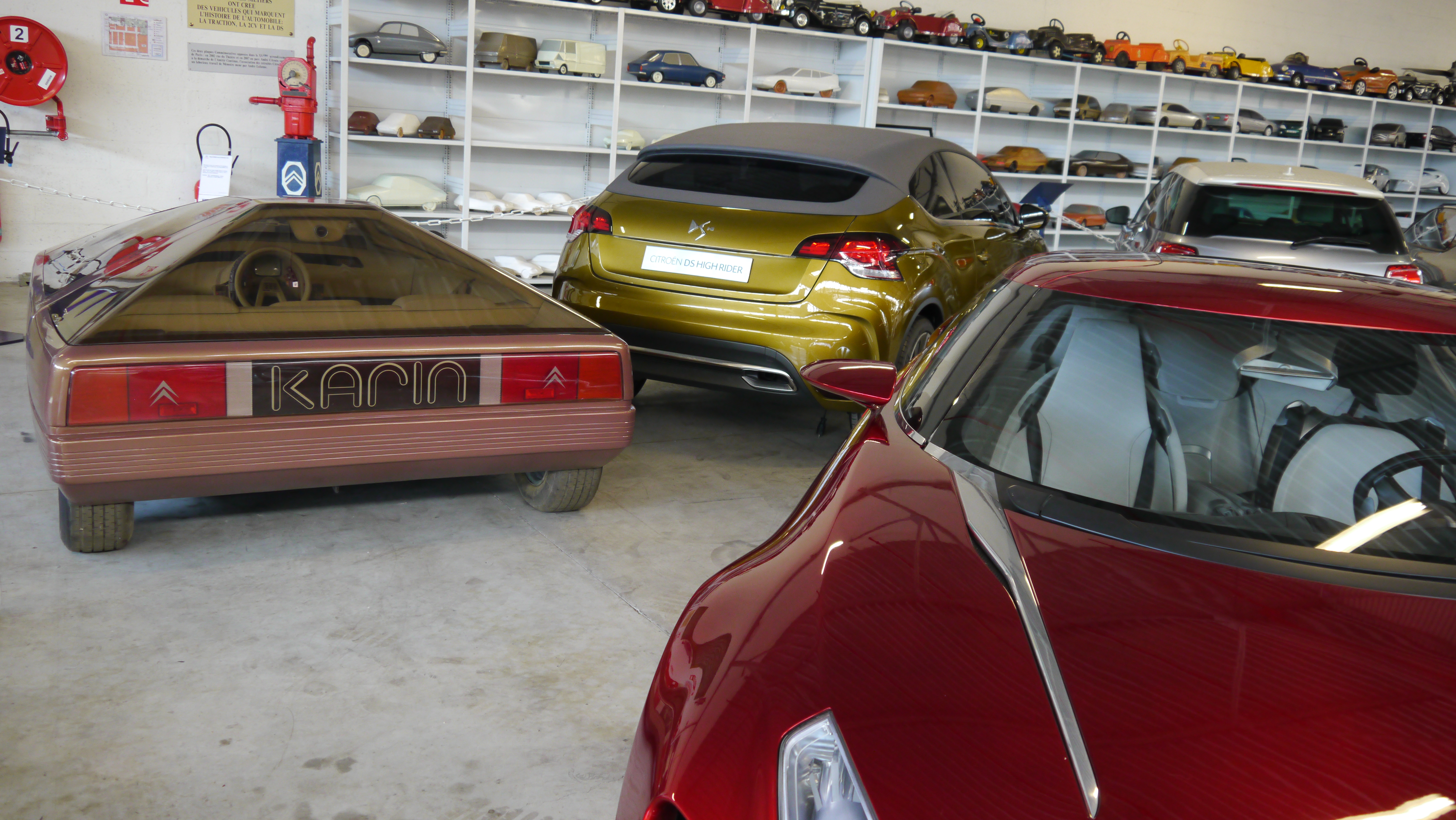 Conservatoire Citroen 310 Citroen Karin